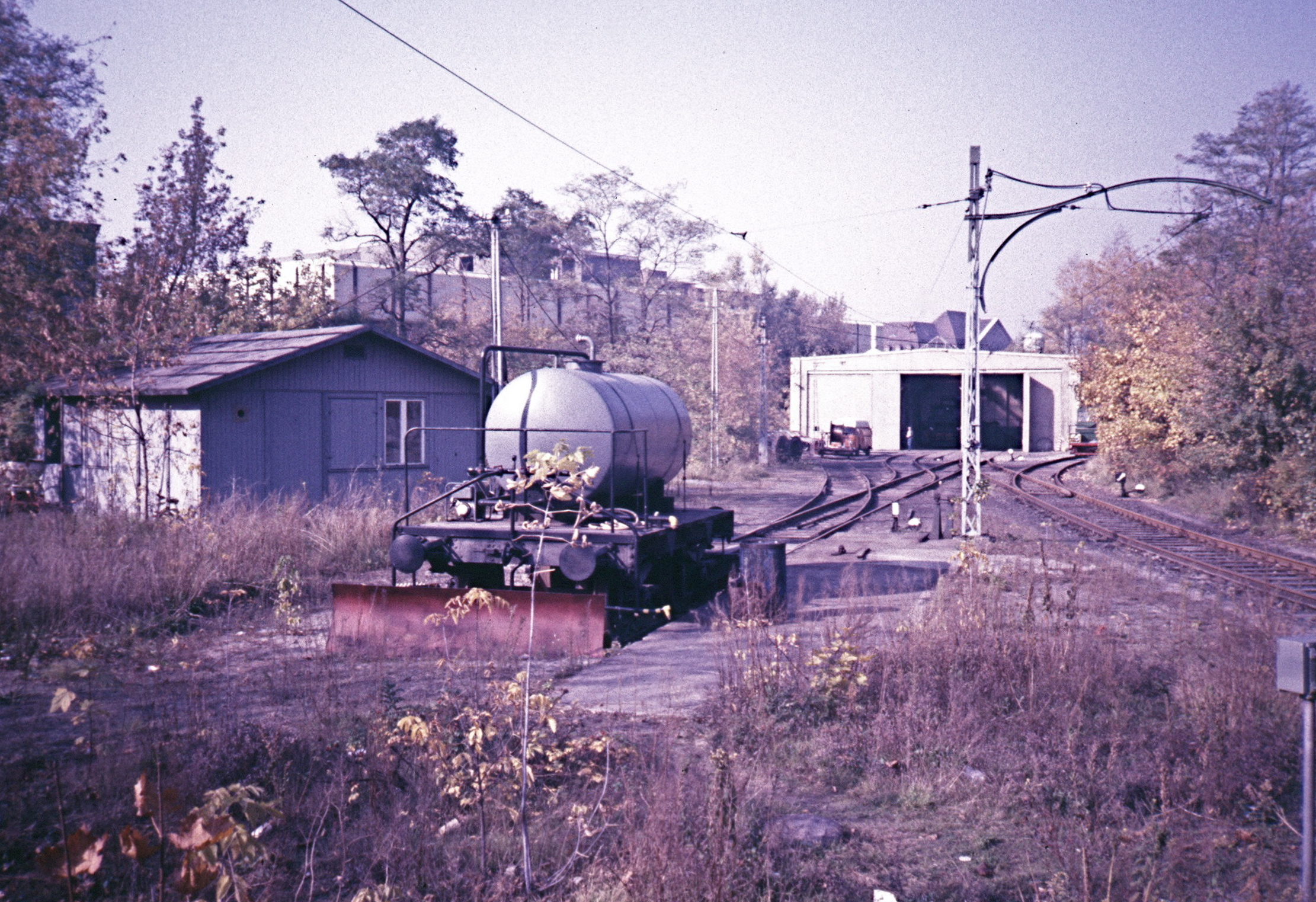 Lokschuppen am Rohrdamm in Berlin-Siemensstadt